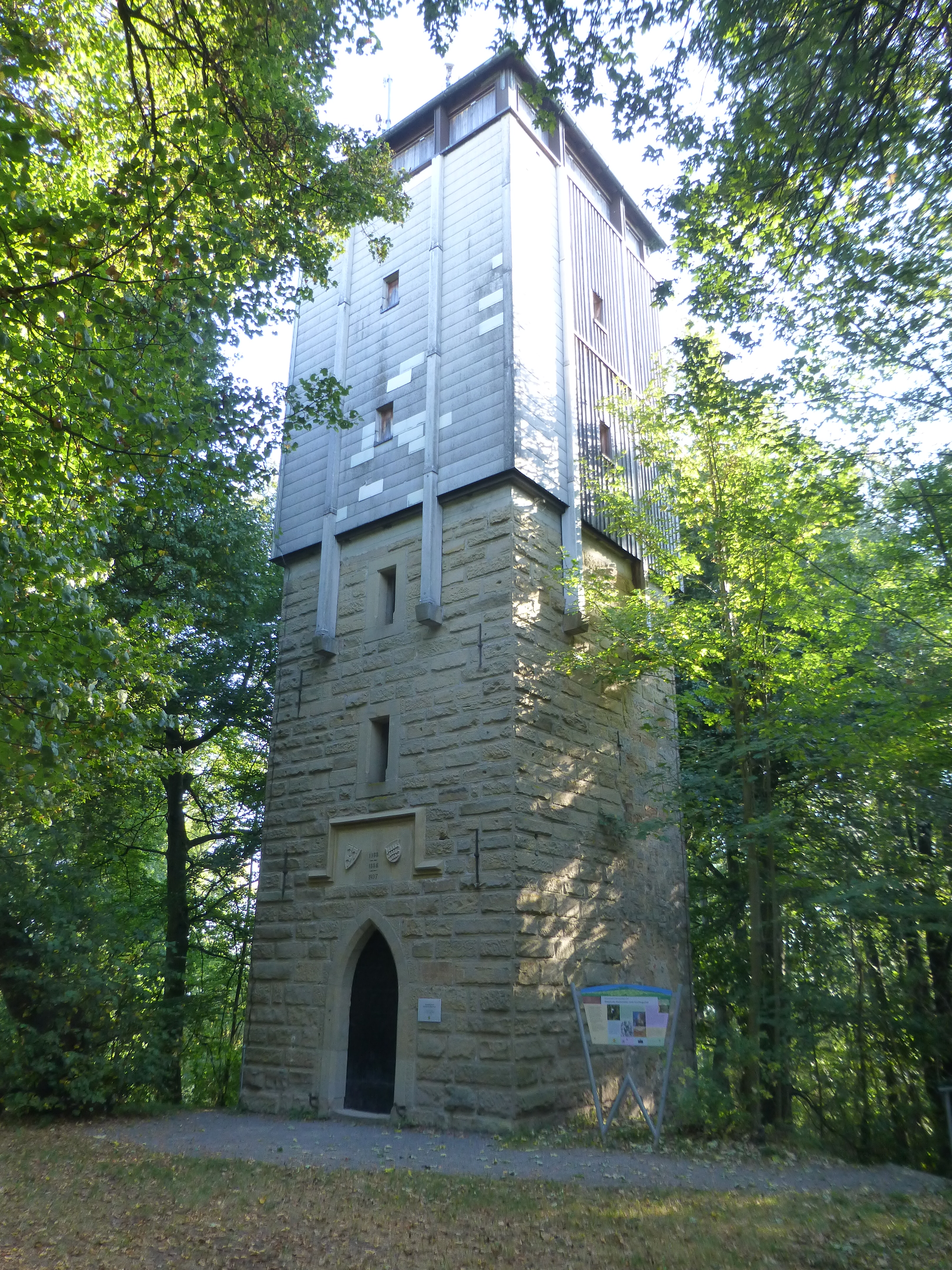 Wunnensteinturm bei Großbottwar-Winzerhausen